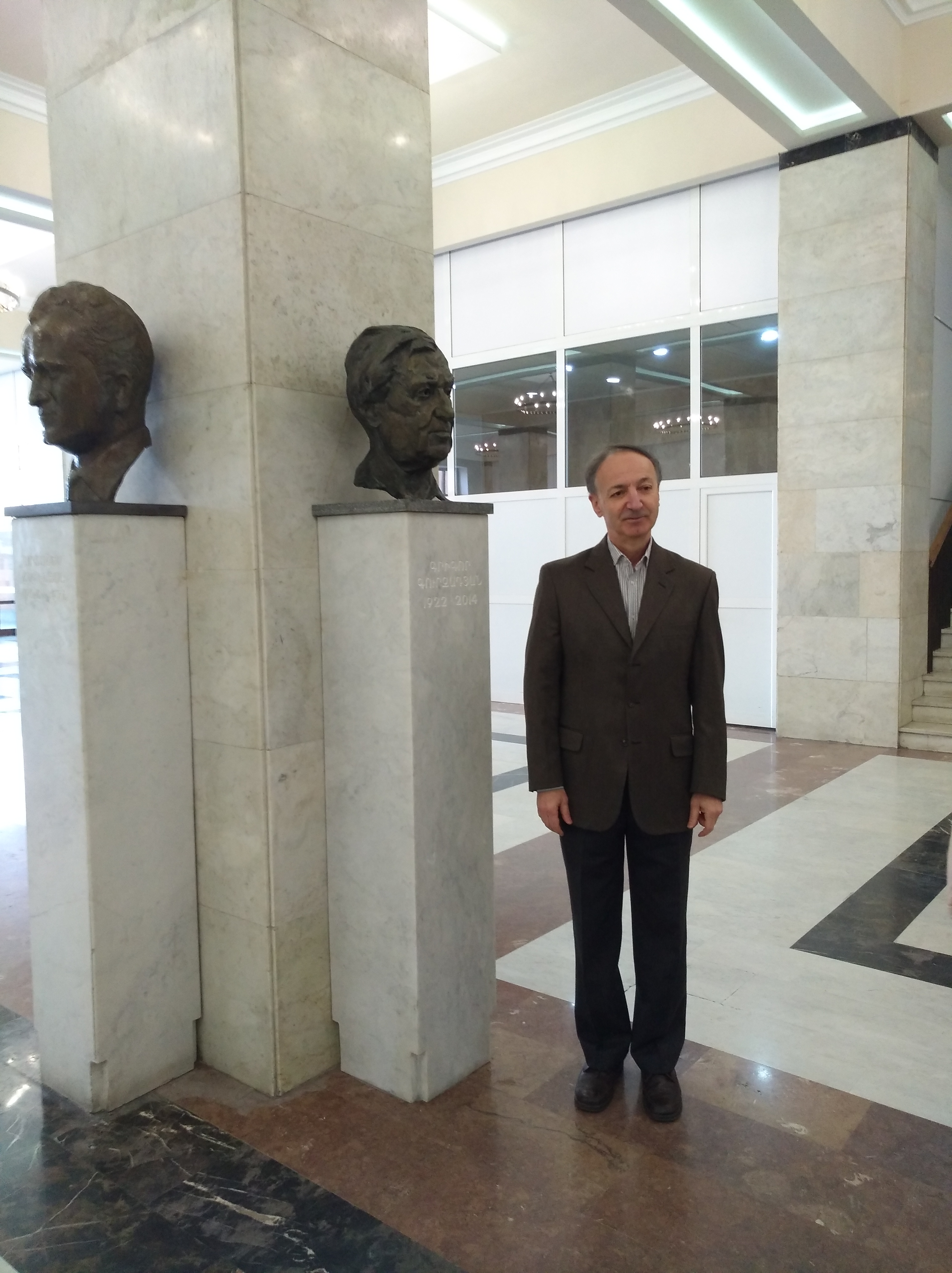 Վահագն Գուրզադյանը հոր՝ Գրիգոր Գուրզադյանի կիսանդրու մոտ